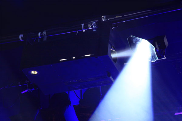 Projecteur Caméléon Telescan Mark-1 lors d'un spectacle en 2011. Ce projecteur provient de la collection personnelle de Jocelyn MOREL